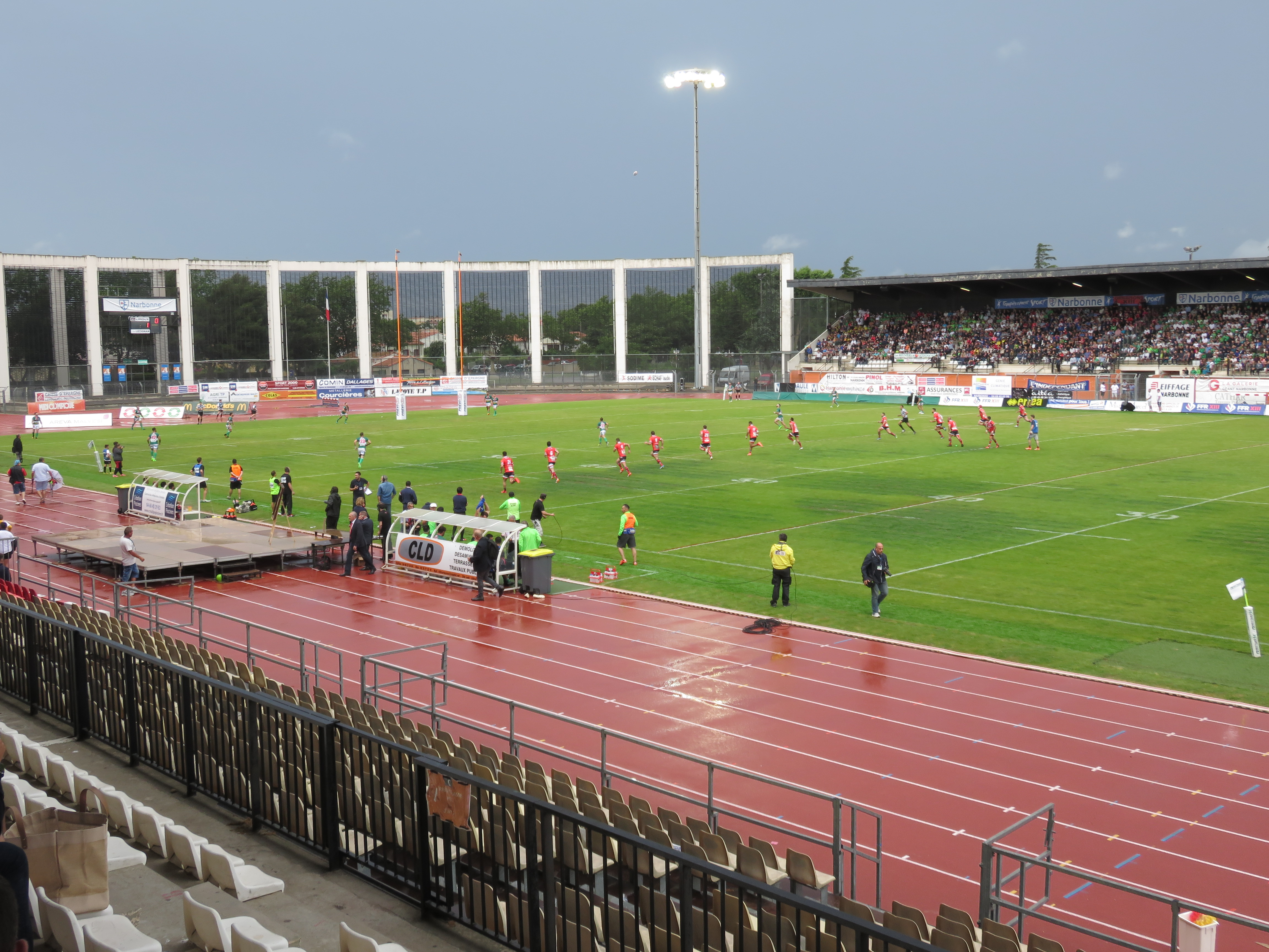 Finale du Championnat de France de rugby à XIII 2017